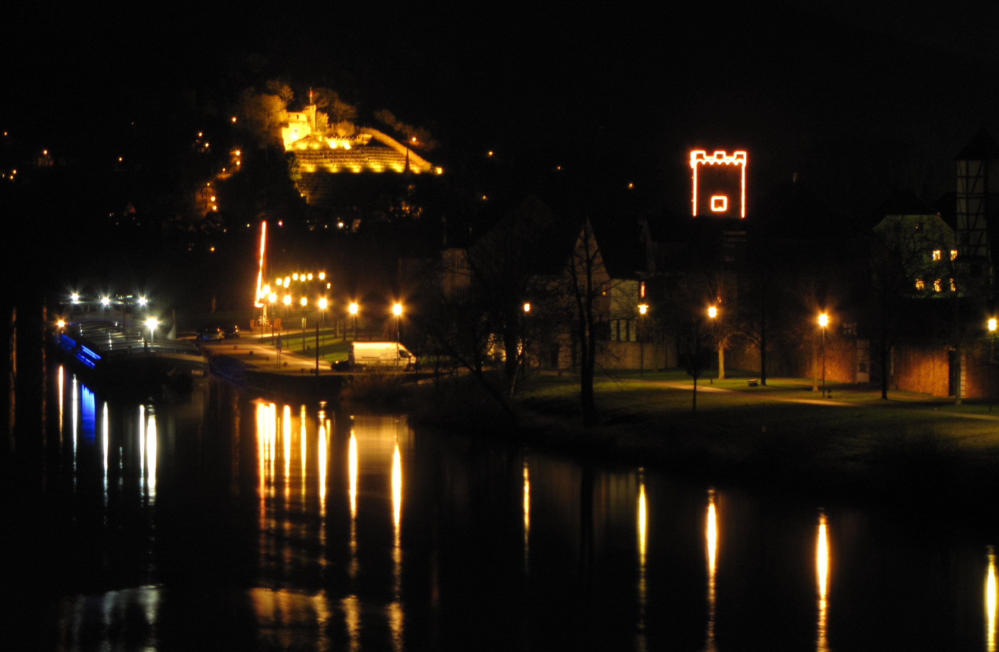 Uferbereich von Wörth am Main bei Nacht, rechts der beleuchtete Schlossturm, links im Hintergrund die Ruine Clingenburg